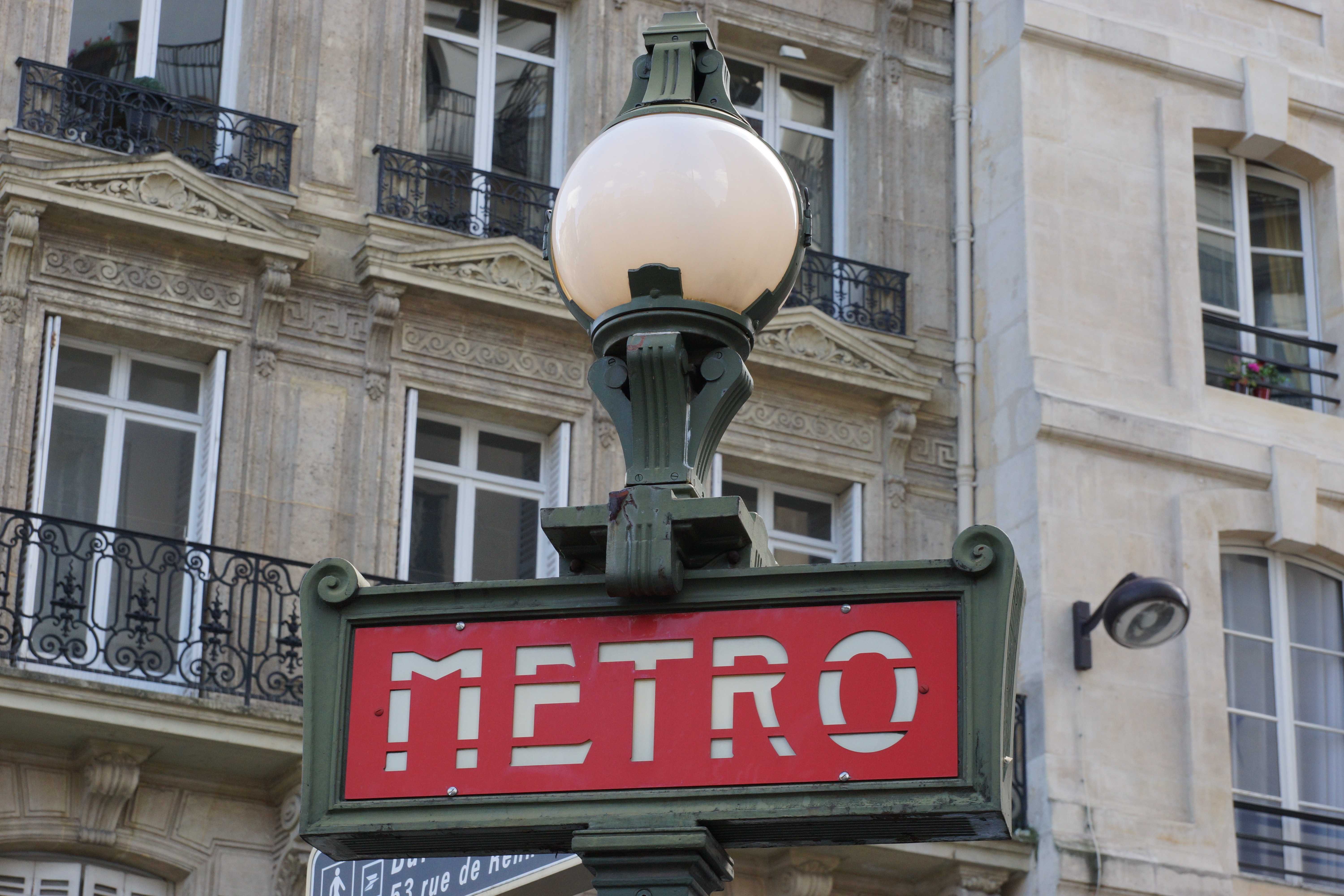 Mabillon metro station, Paris.